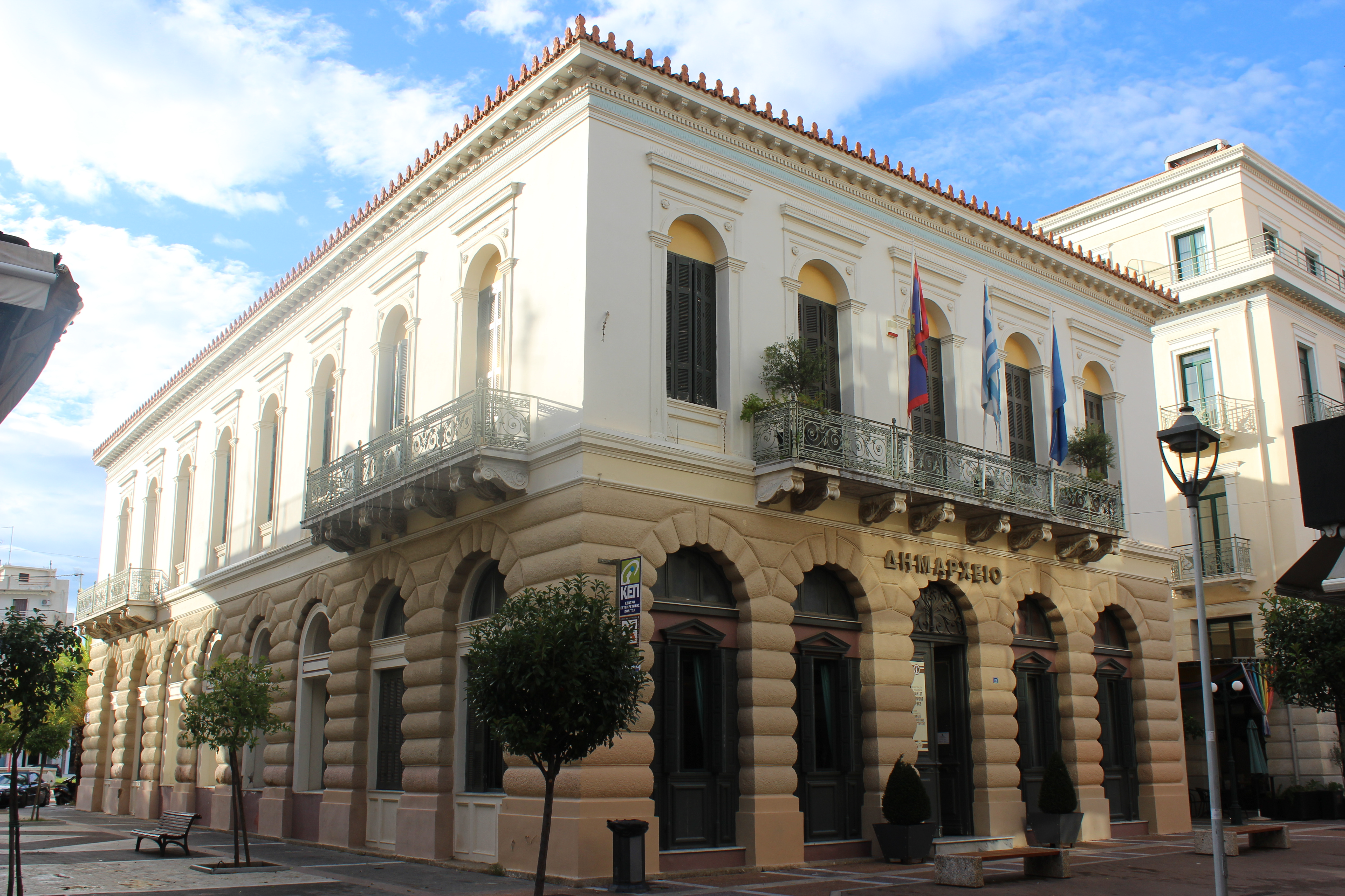 Δημαρχείο Καλαμάτας«Δημαρχείο Καλαμάτας»